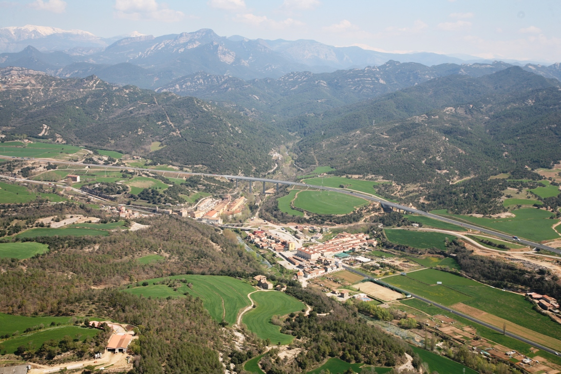 Vista aèria de Cal Rosal